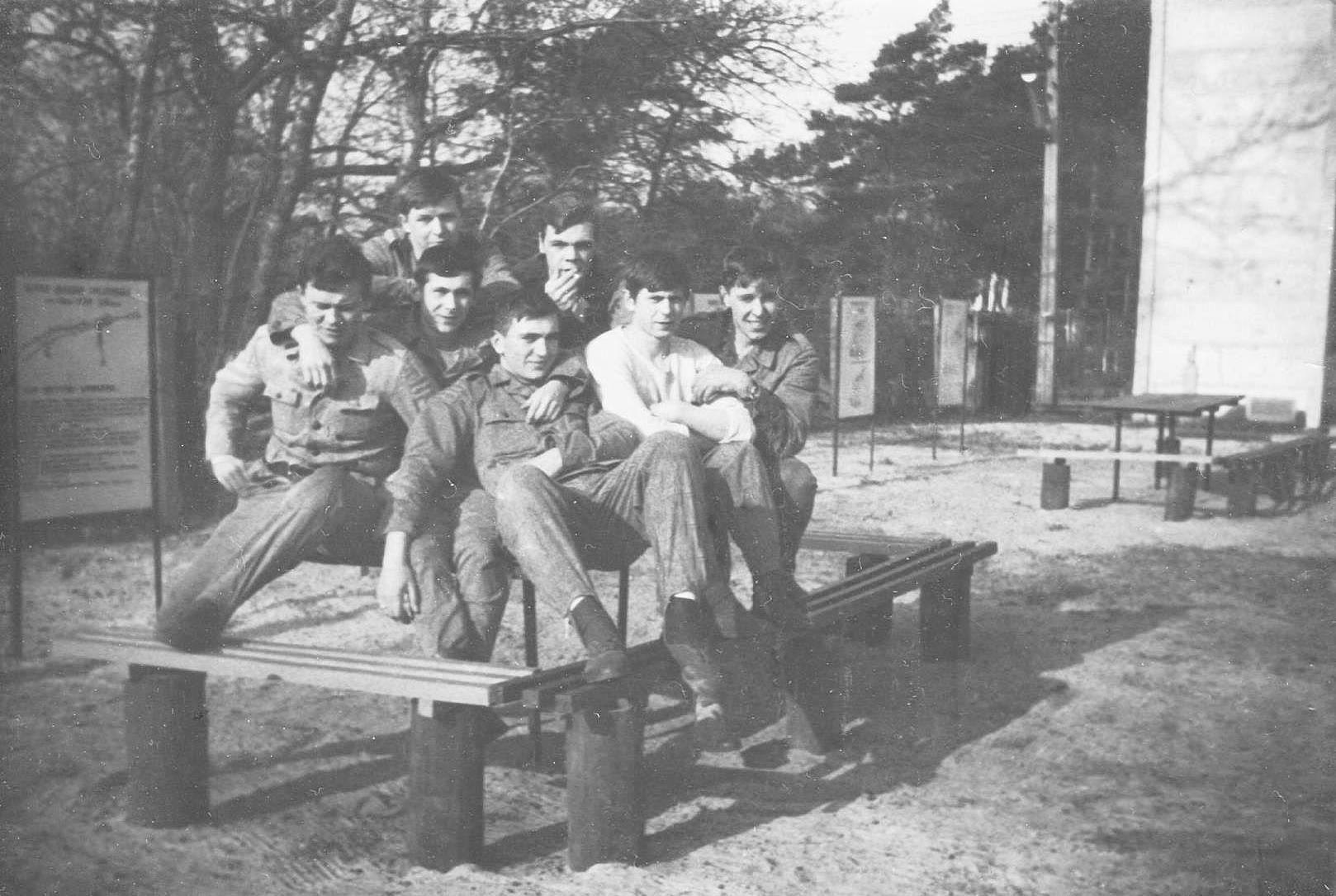 Żołnierze WOP – Strażnica Wojsk Ochrony Pogranicza Dziwnów